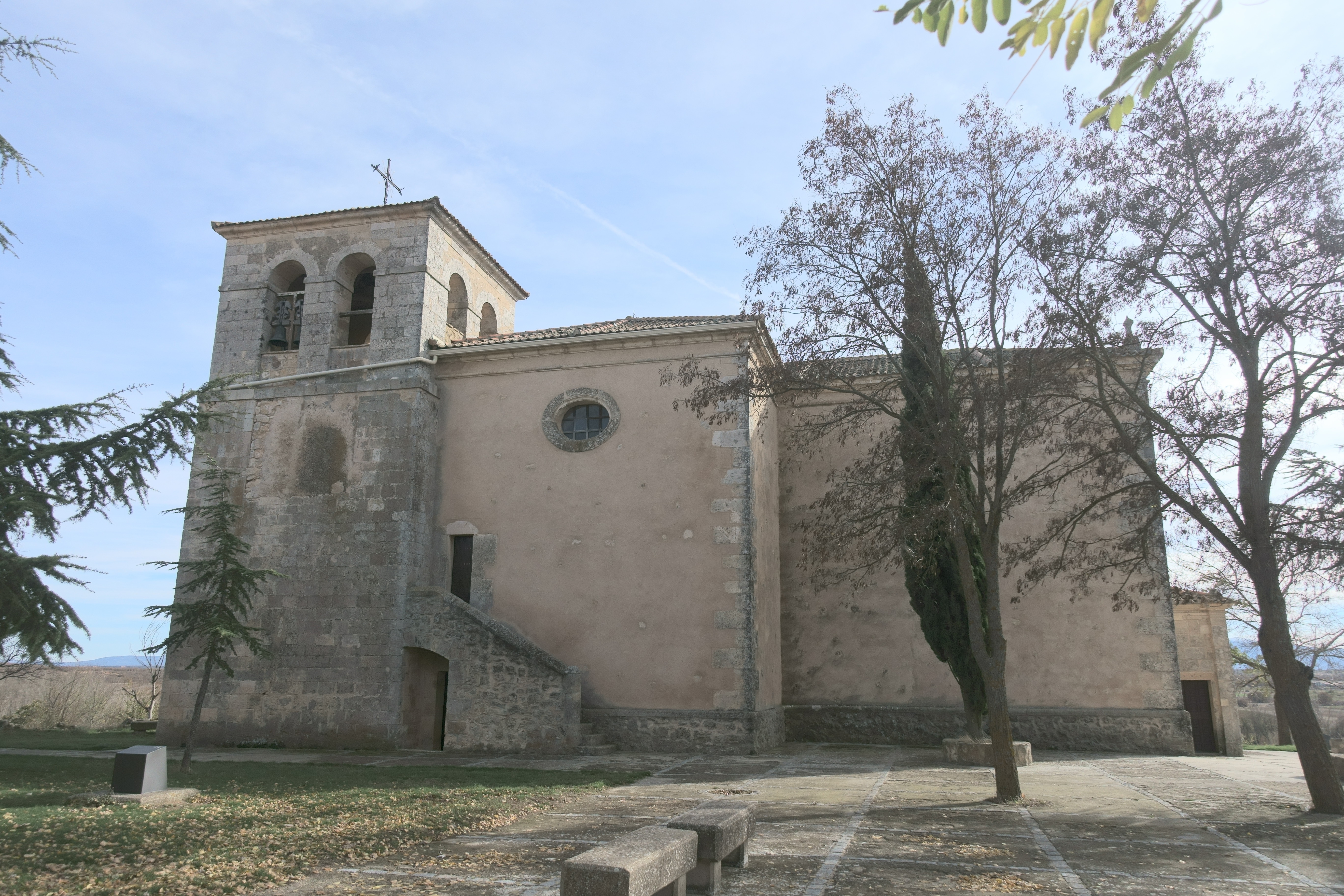 Iglesia de San Vitores, en Grajera (Segovia, España).